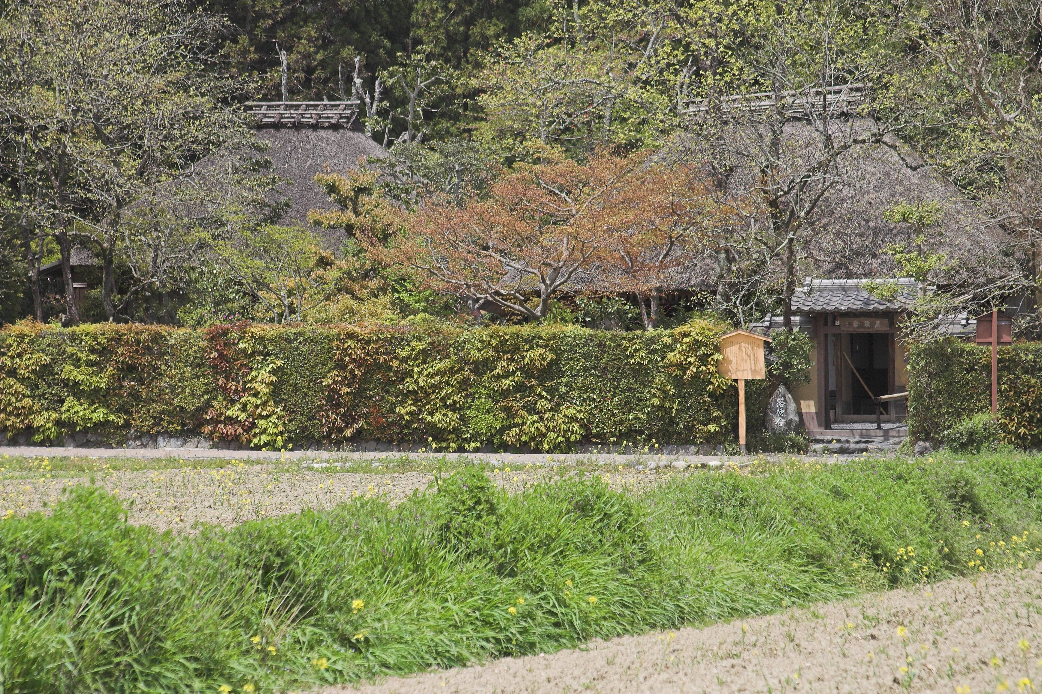 落柿舎/Rakushisya(Kyoto, Japan)